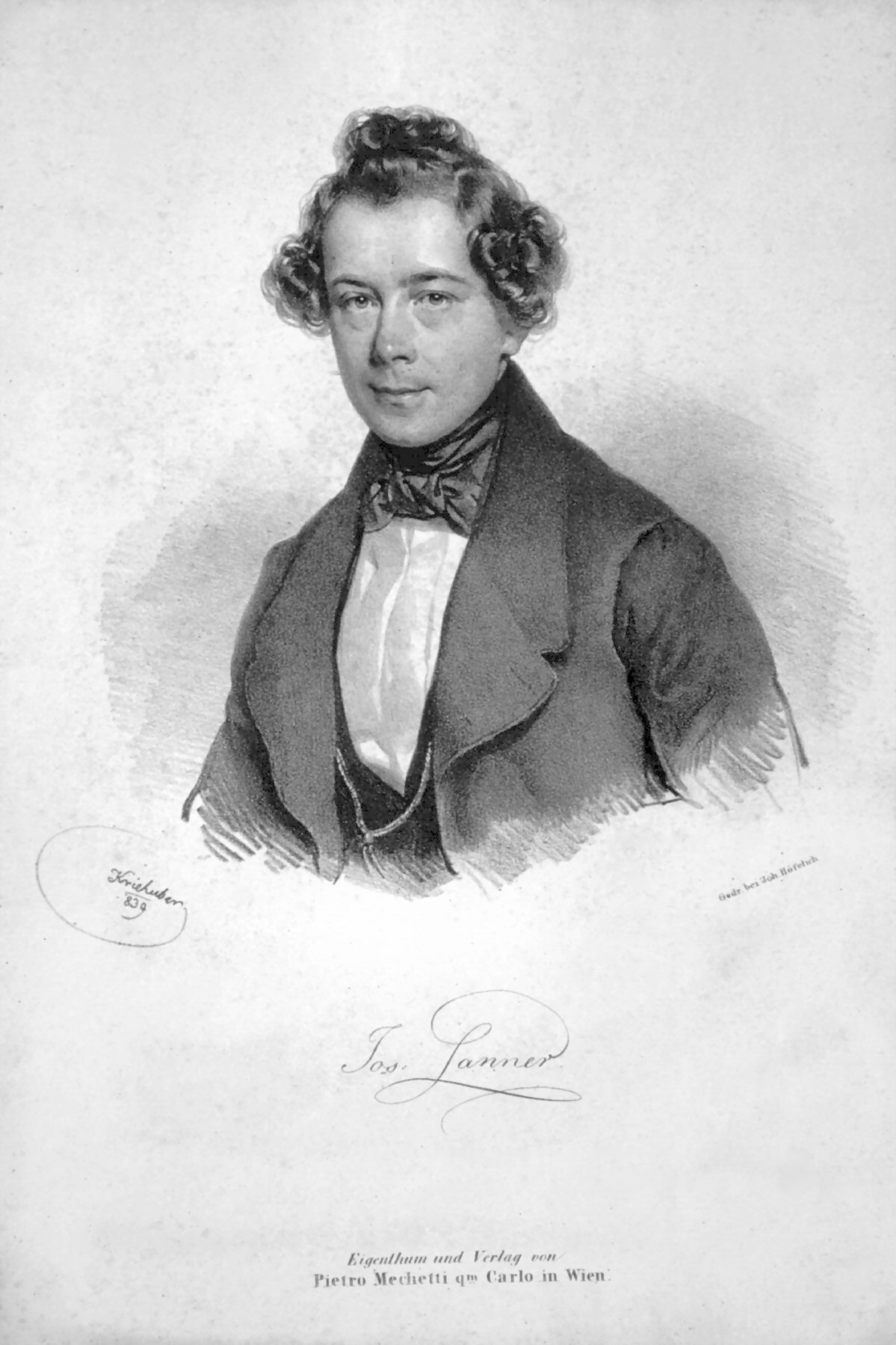 Joseph Lanner, Lithographie von Josef Kriehuber, 1839